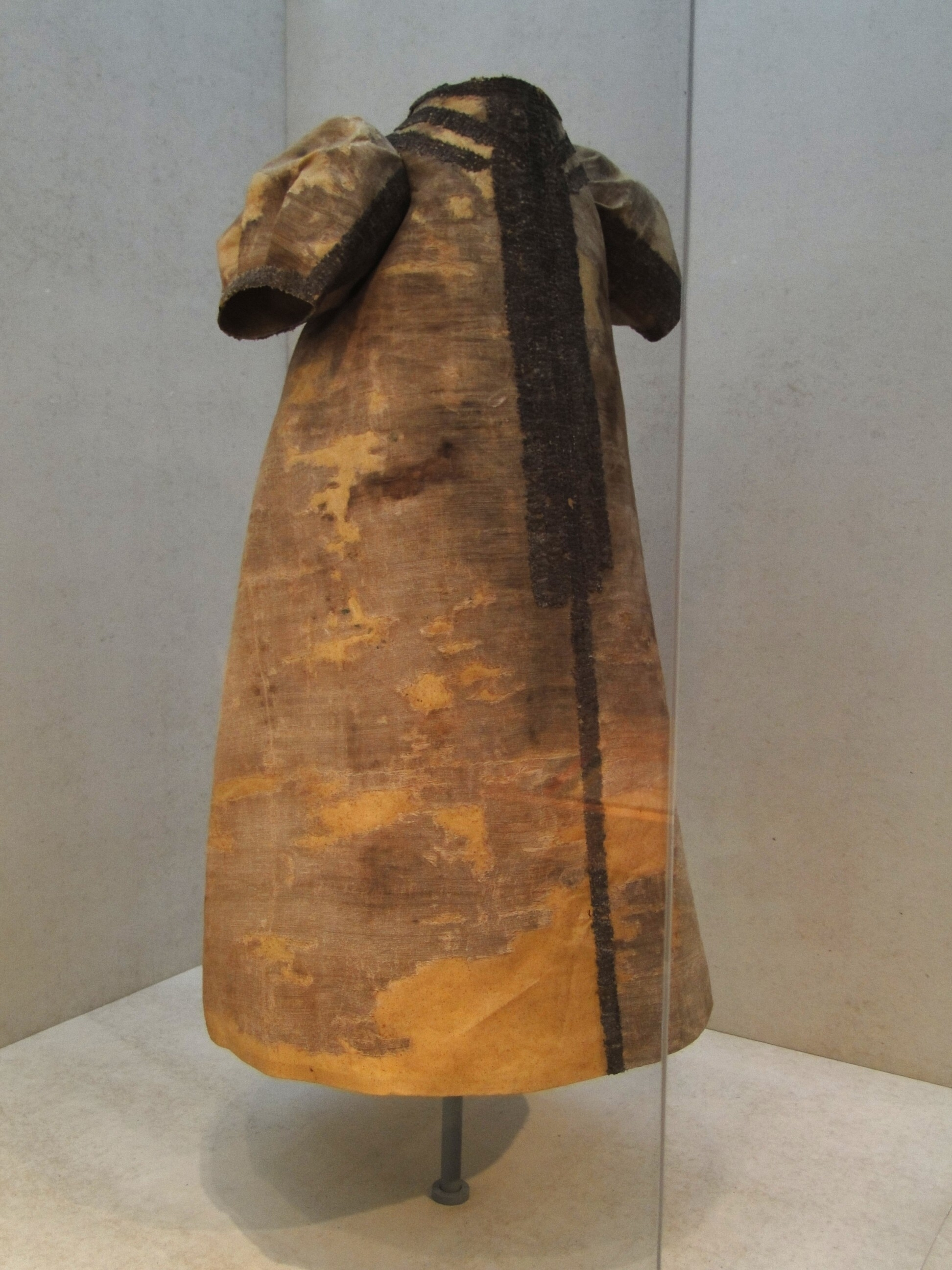 Totenkleid aus der Sophienkirche, heute Stadtmuseum Dresden; Fotografie mit Fotoerlaubnis